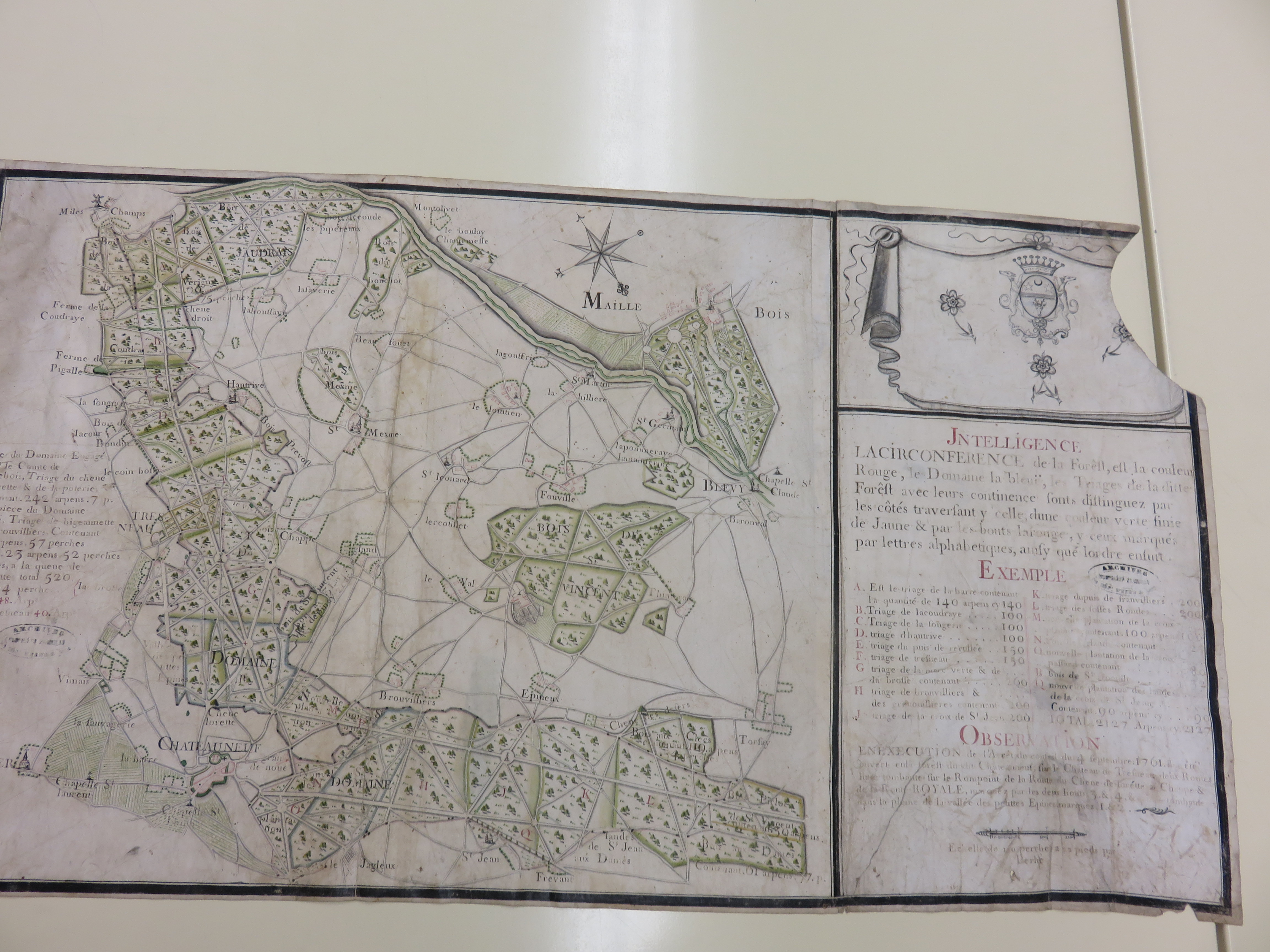 Carte royale de la forêt de Châteauneuf en Thymerais indiquant l'ouverture de deux routes menant au château de Tresneau